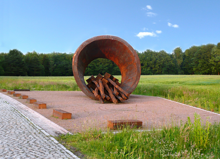 Denkmal Verladerampe Bergen-Belsen von Hans-Jürgen Breuste (2008). Verdichteter Stahl, 5 m hoch, 350 cm tief, 30-40 cm stark, 130 t schwer. Geschmiedet in der Glöckner-Hütte, Osnabrück